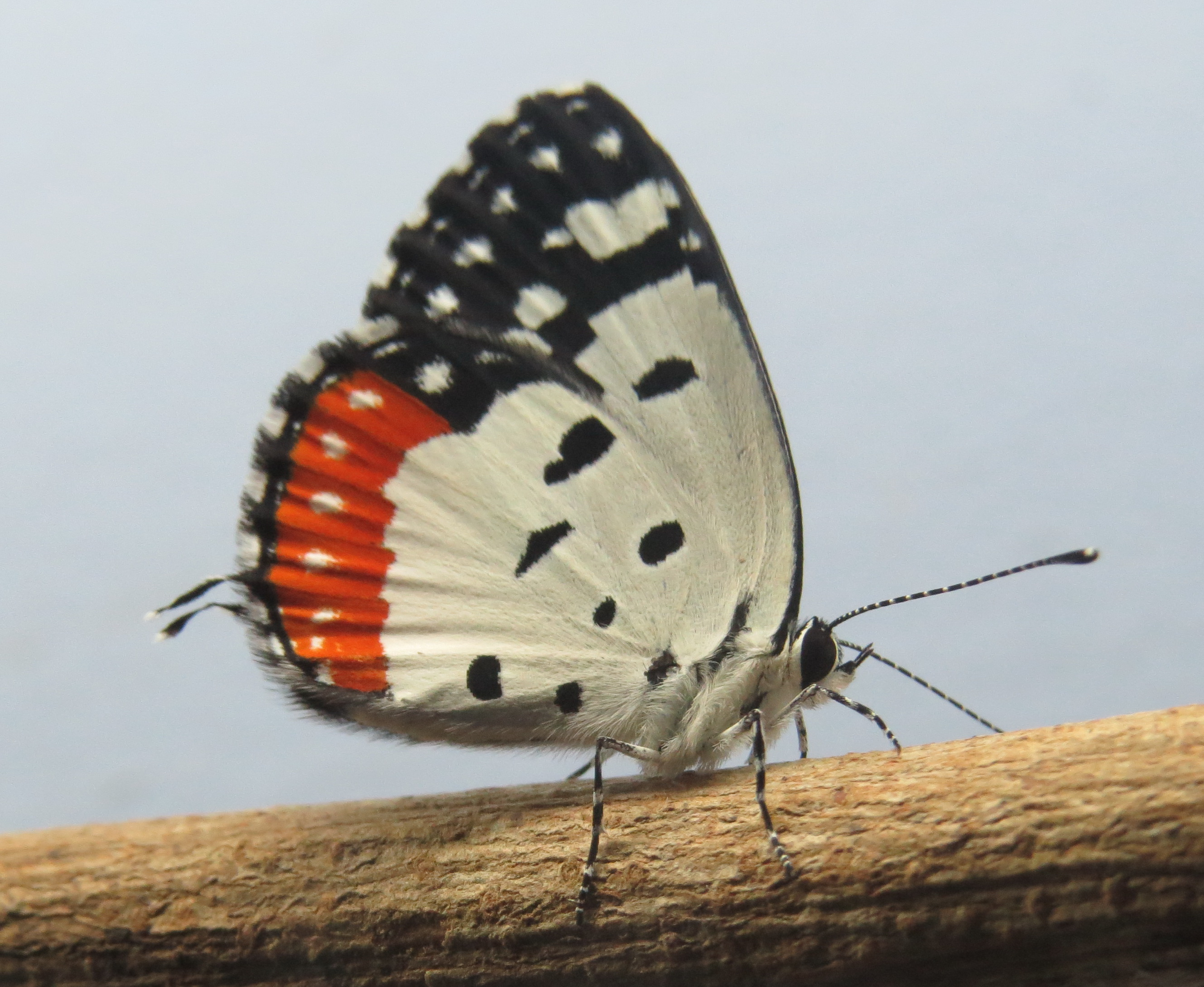 Lepidoptera Lifecycles